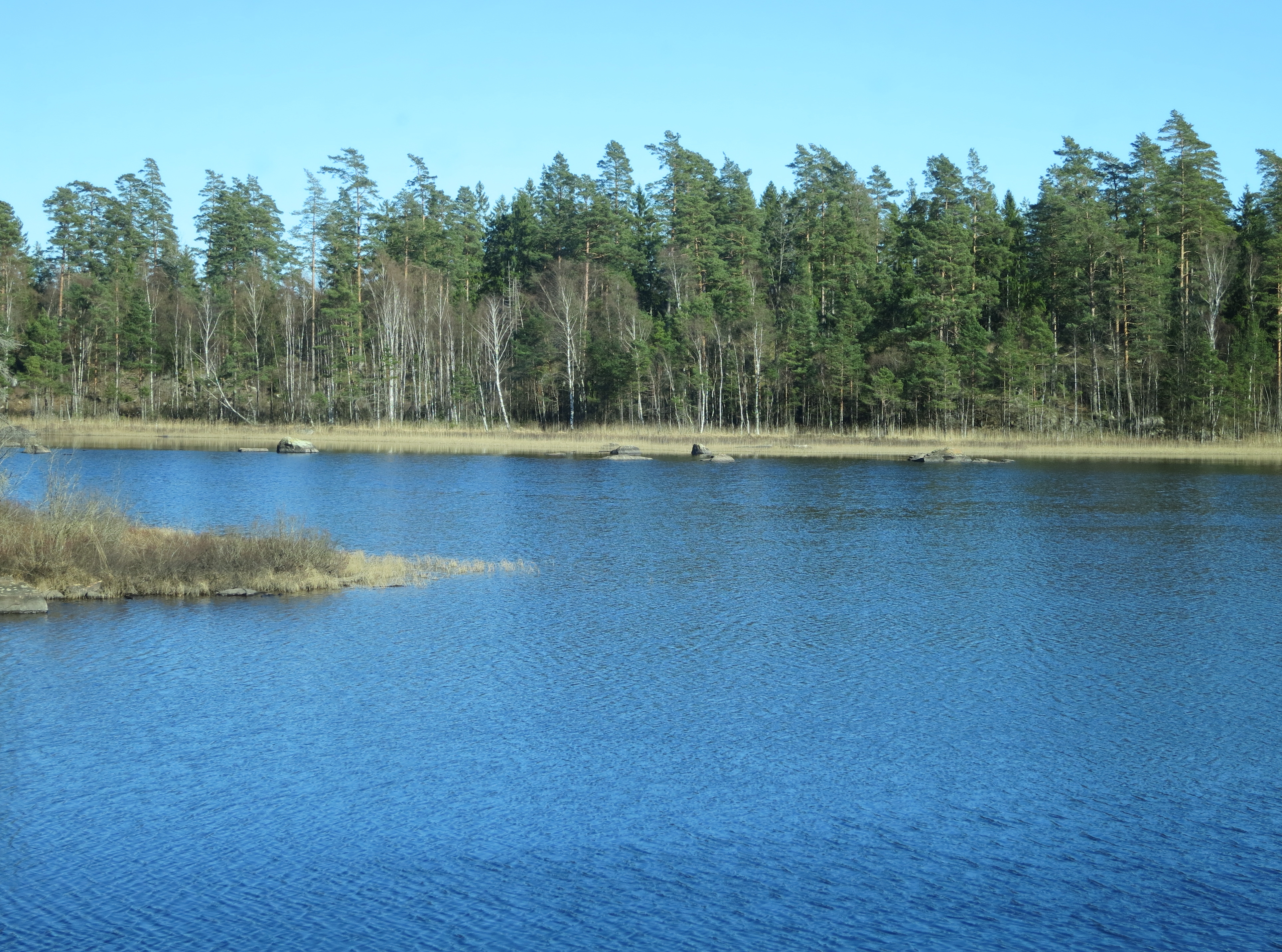 Hallsjön